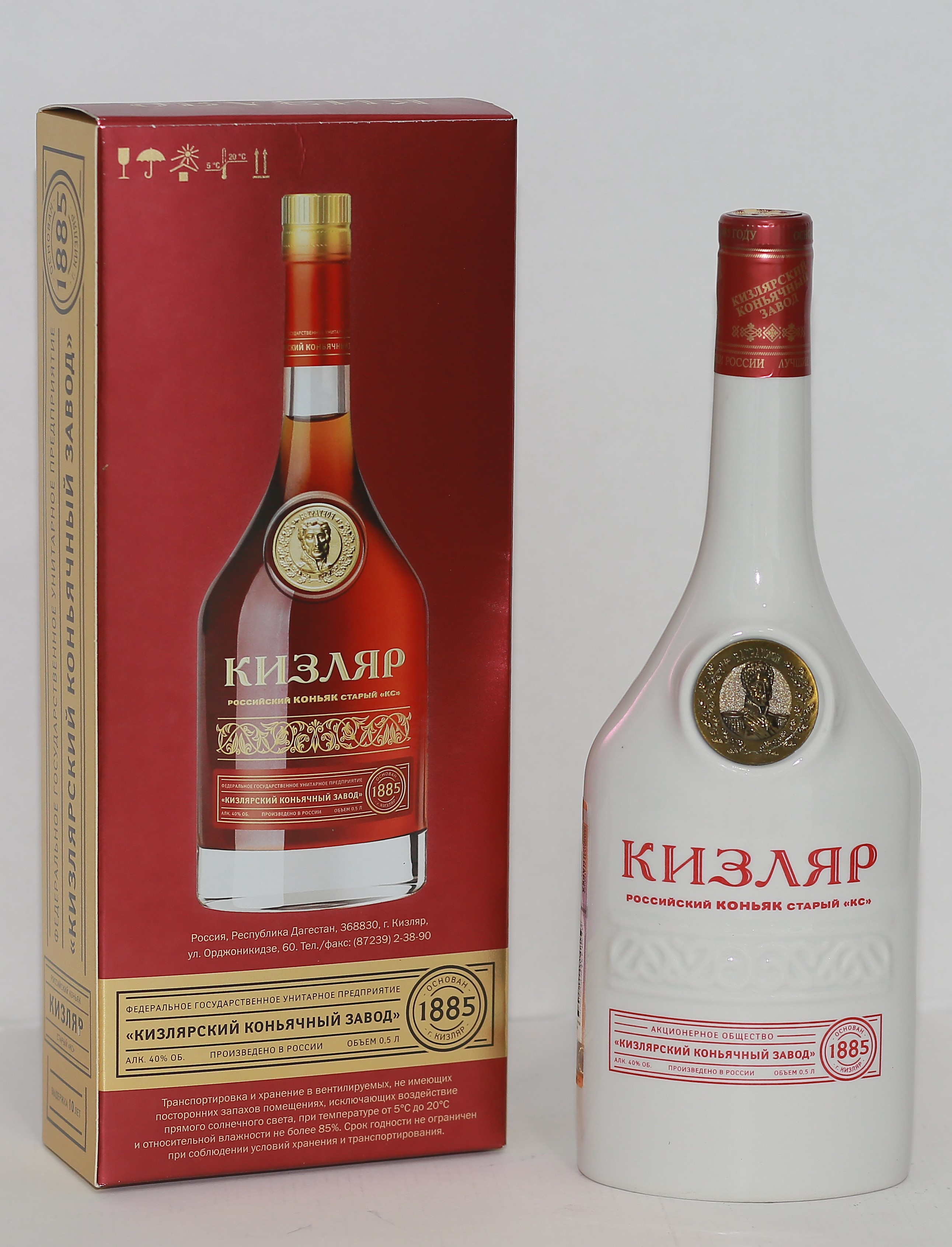 Коньяк Кизляр (фарфор)